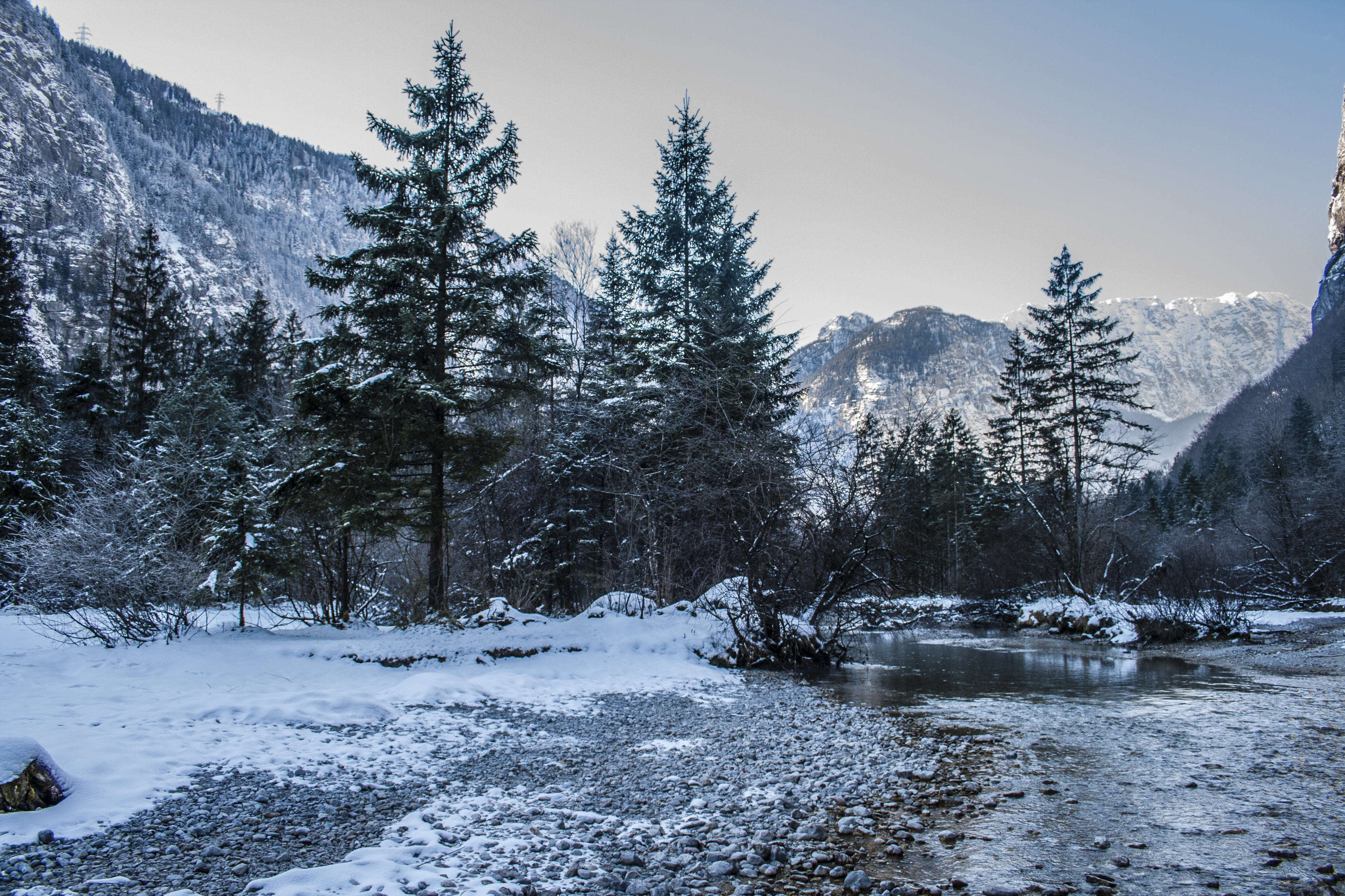 Bluntautal This media shows the Geschützter Landschaftsteil in Salzburg with the ID GLT00007.